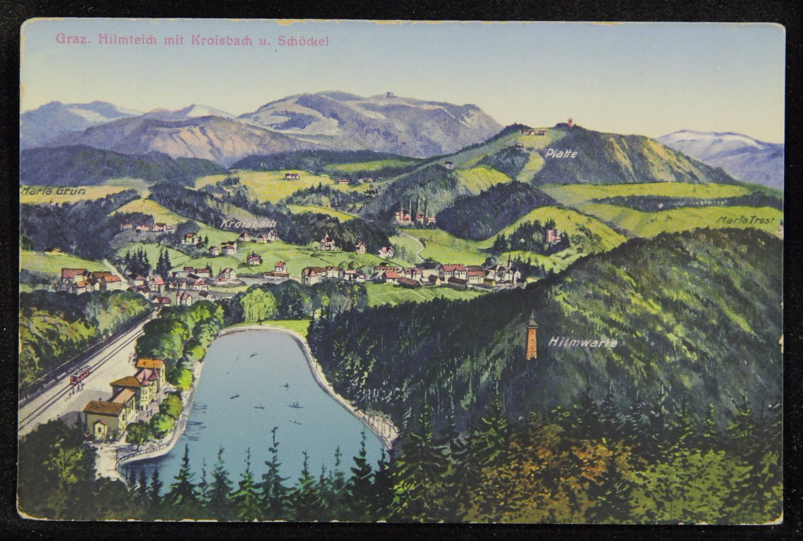 Der Hilmteich in Graz auf einer Ansichtskarte von 1913-1914, im Hintergrund Schöckl und Platte